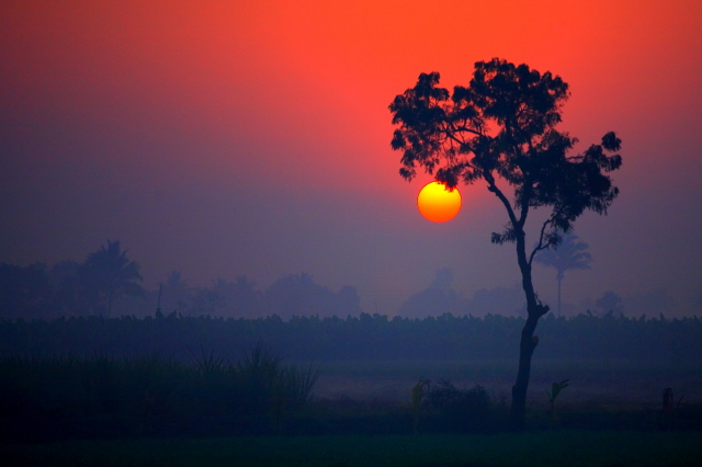 on way to bhigwan...